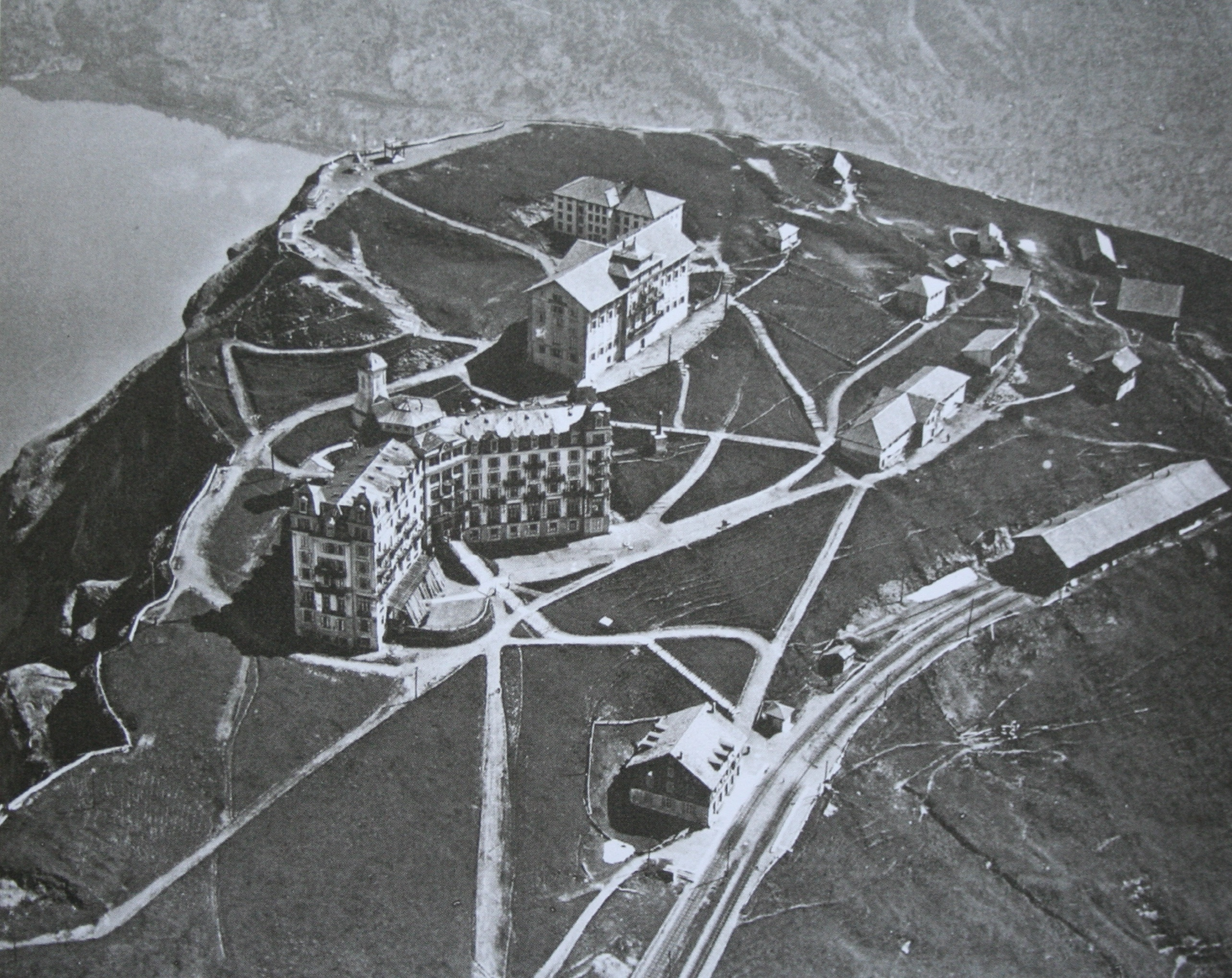 Rigi Kulm vor 1920, Aufnahme von Walter Mittelholzer (1894 - 1937)